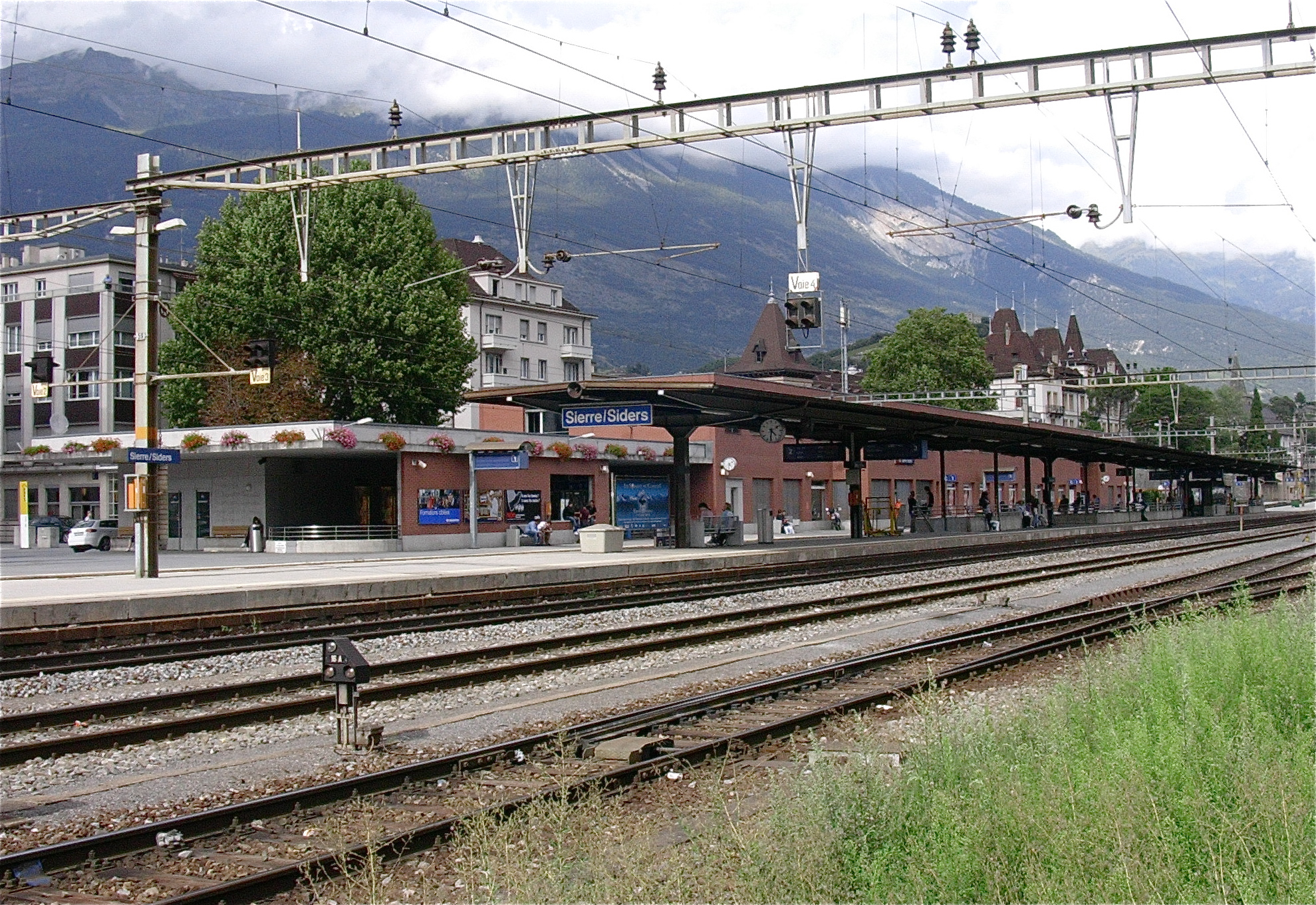 Gare CFF de Sierre